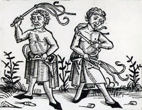 Schedel’sche Weltchronik, fol. CCXVr